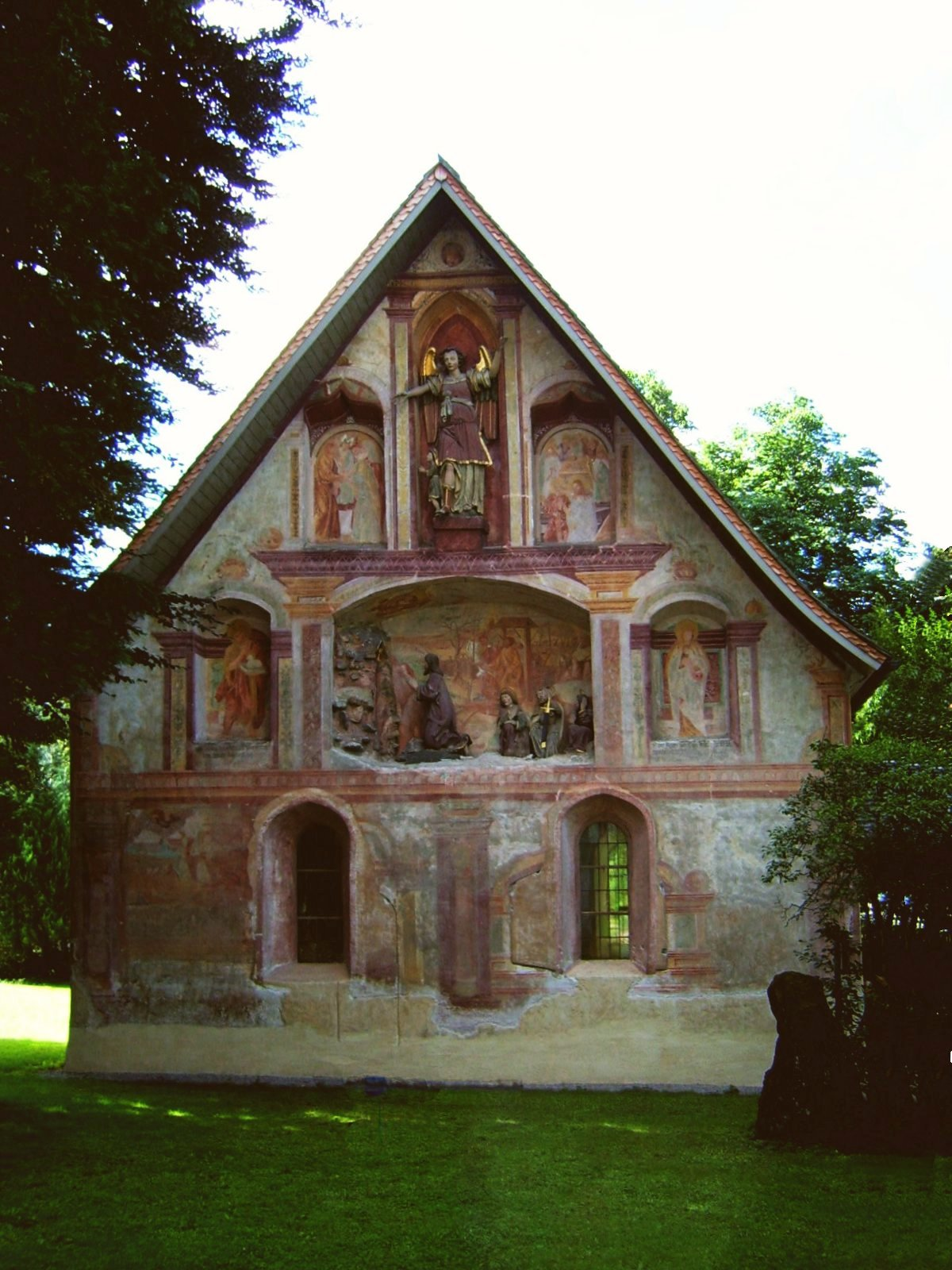 Seelenkapelle in Oberstdorf